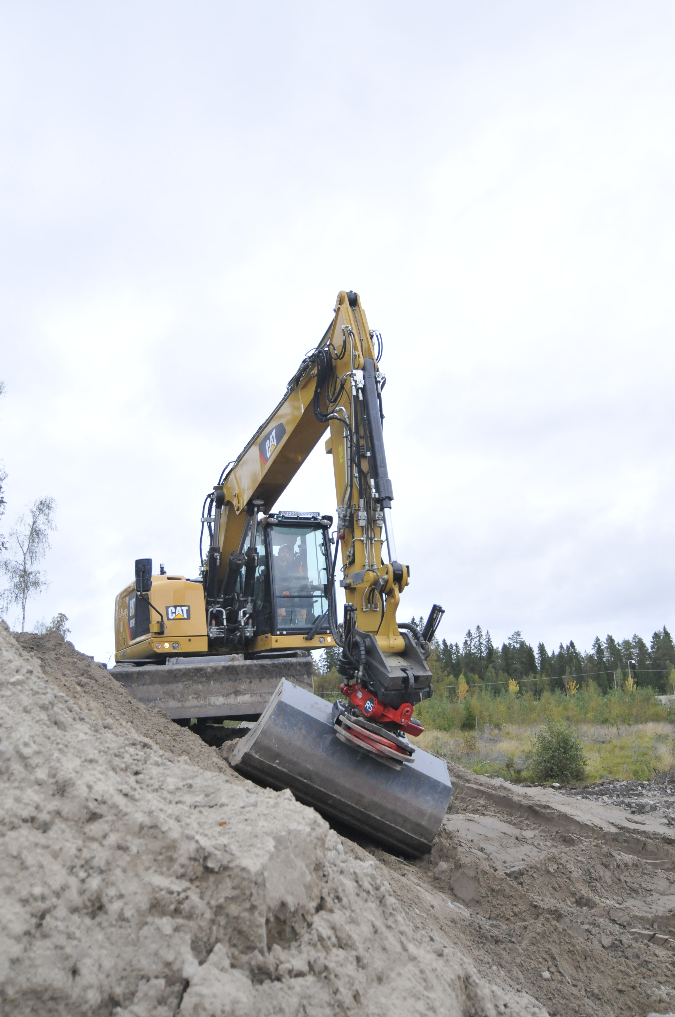 En tiltrotator effektiviserar grävmaskinen; färre maskinförflyttningar, större precision i arbetet, enklare redskapsbyten etc.